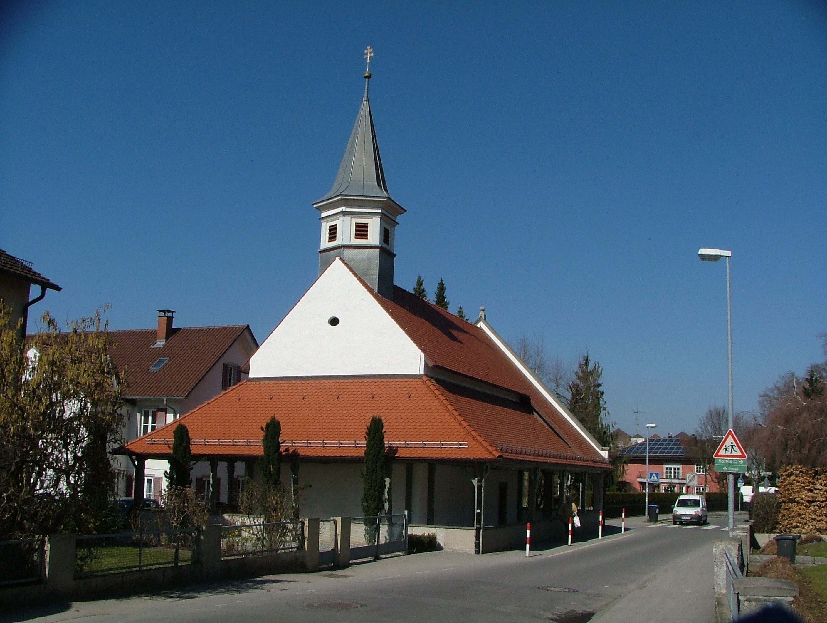 Außenansicht